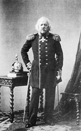 Князь Иван Леонтьевич Шаховской